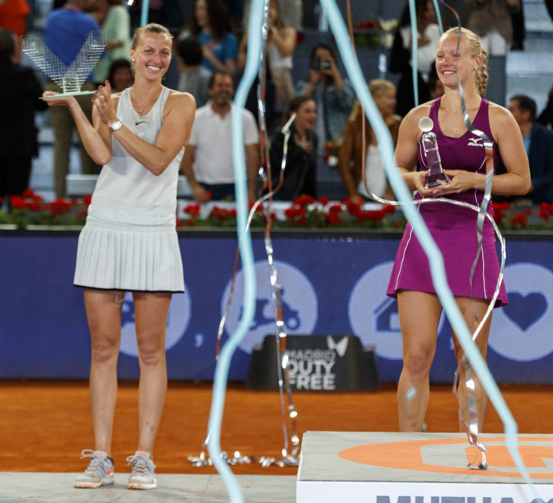 La primera teniente de alcalde del Ayuntamiento de Madrid y concejala de Equidad Derechos Sociales y Empleo, Marta Higueras, ha sido la encargada de entregar anoche el premio a la campeona del Mutua Madrid Open femenino Petra Kvitova, que con esta victoria ha marcado un hito en el torneo madrileño: se ha convertido en la primera tenista que gana tres veces la prueba, por delante de Serena y Halep.